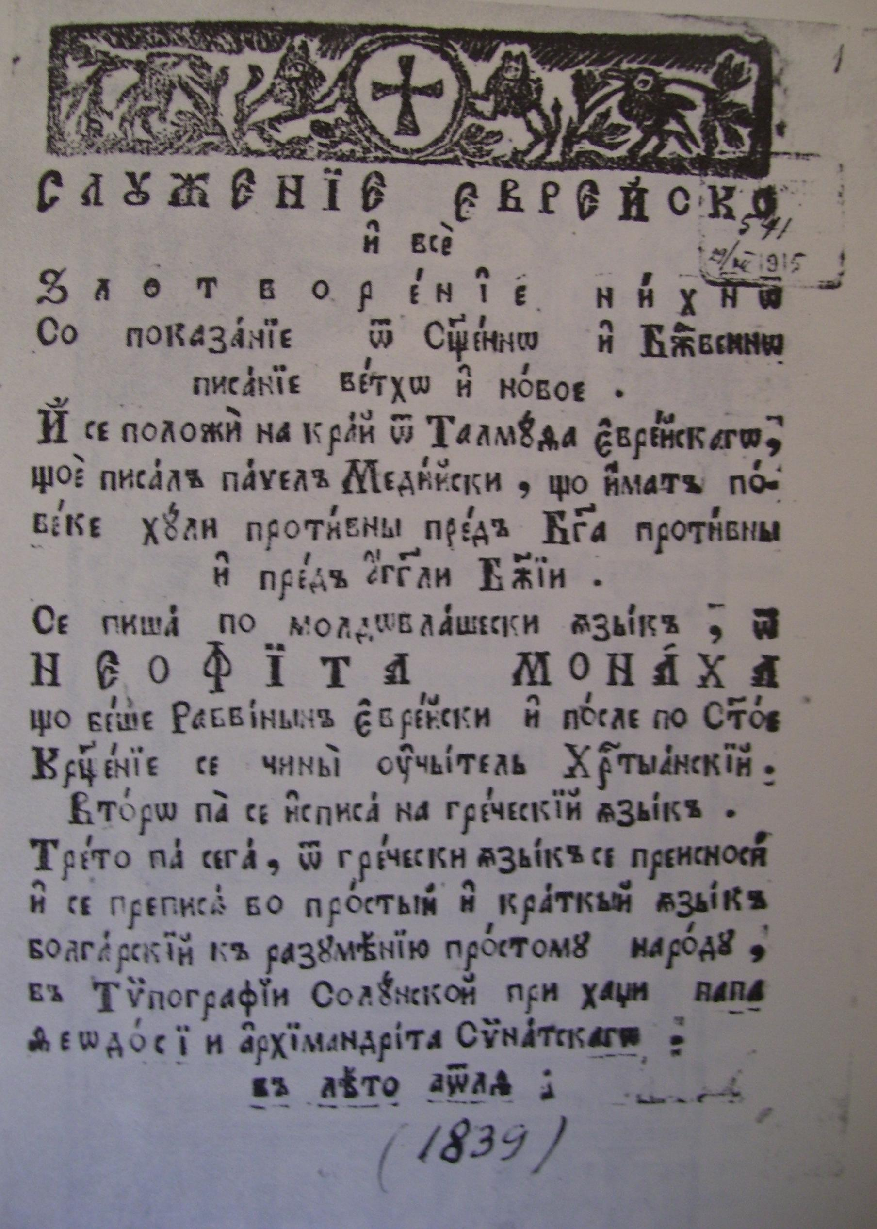 Заглавна страница на "Служение еврейское" на Натанаил Охридски